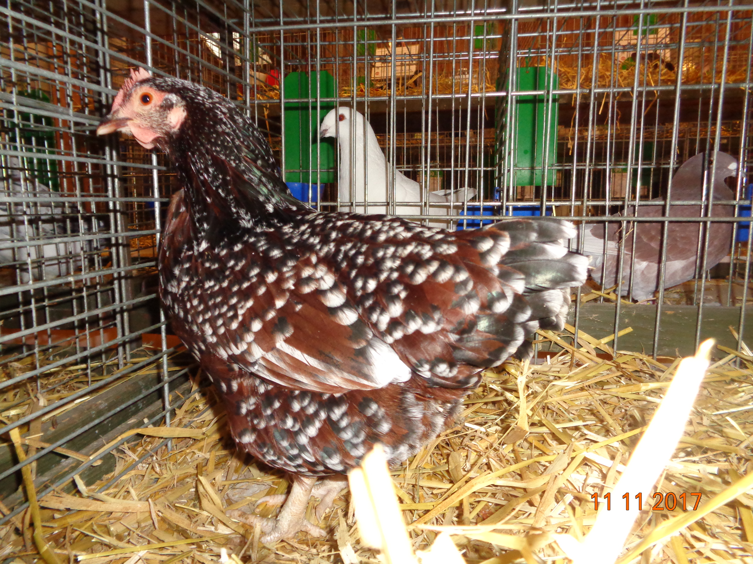 Poule sussex naine tricolore.